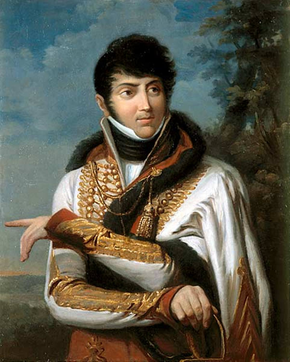 Maurice Dupin de Francueil est chef d'escadron au 1er régiment de Hussards et Chevalier de la Légion d'Honneur. Il est le père d'Aurore Dupin de Francueil, plus connue sous le pseudonyme de George Sand.